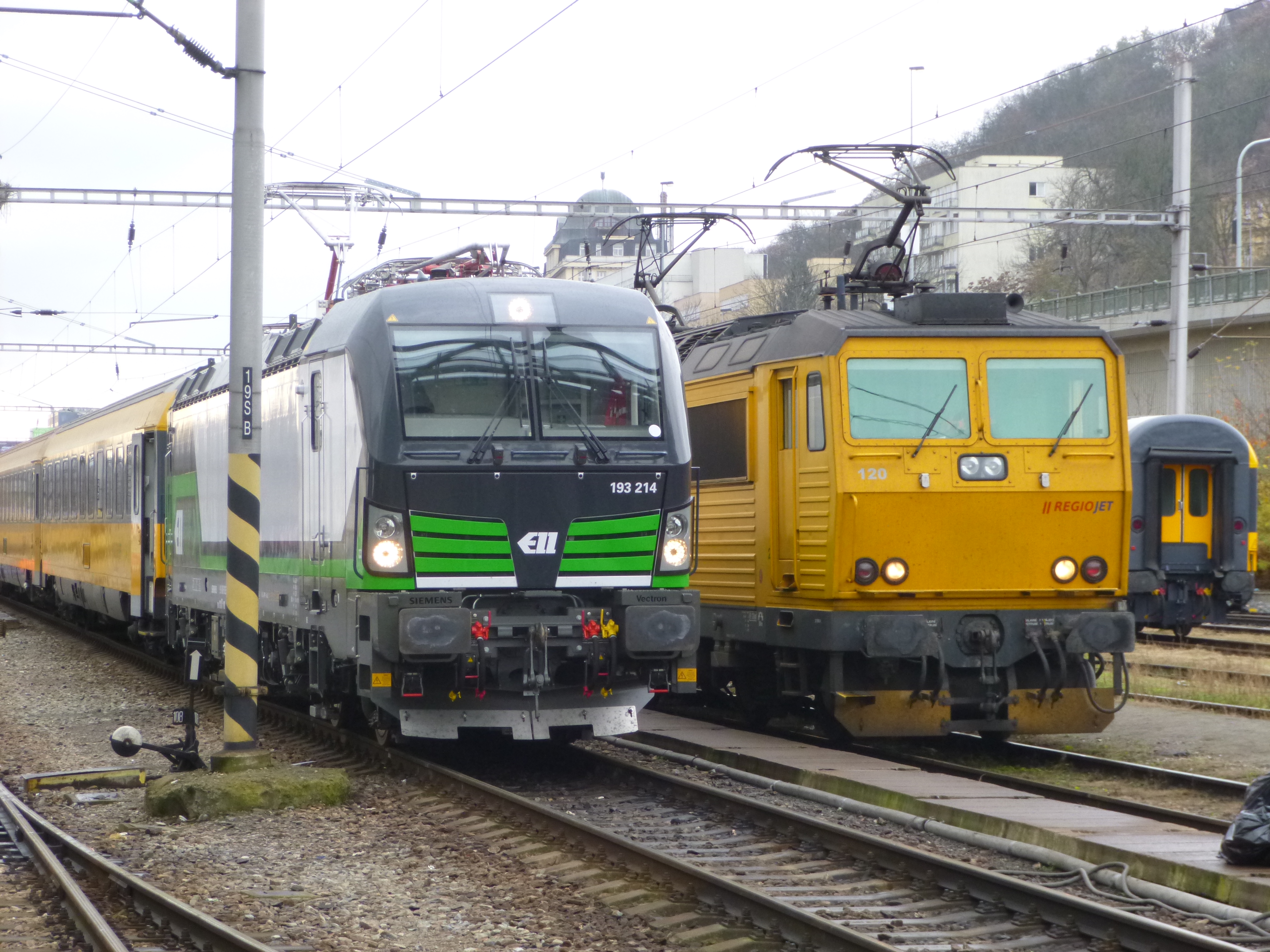 Praha-Smíchov, Osmivozový RJ IC 1007 s lokomotivou 193.214, vpravo 163.120. Spoj 1007 toho dne dorazil do výchozí stanice Praha hl.n. se zpožděním zhruba tři čtvrtě hodiny, v koncové stanici Havířov bylo zpoždění obdobné. Vlastníkem lokomotivy 193.214 je leasingová společnost ELL Austria GmbH se sídlem ve Vídni.